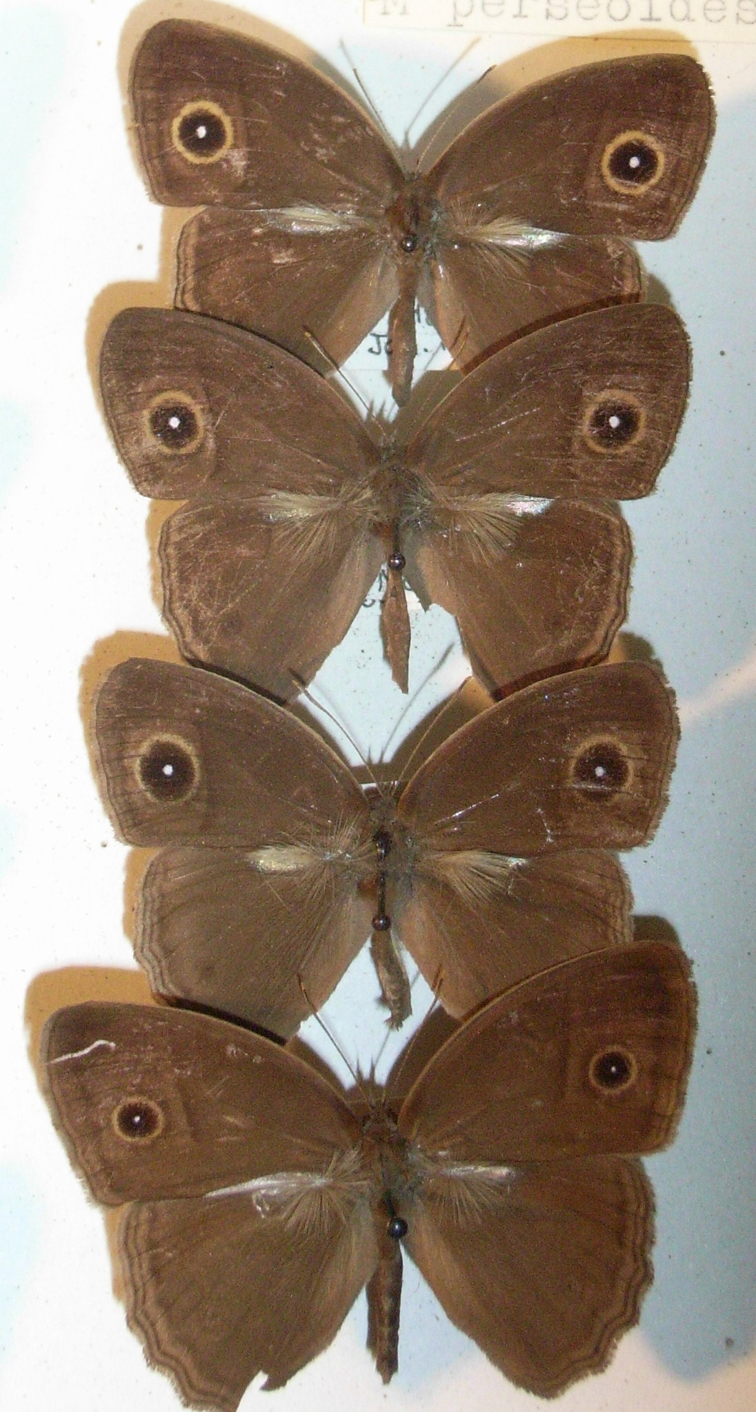 Mycalesis perseoides